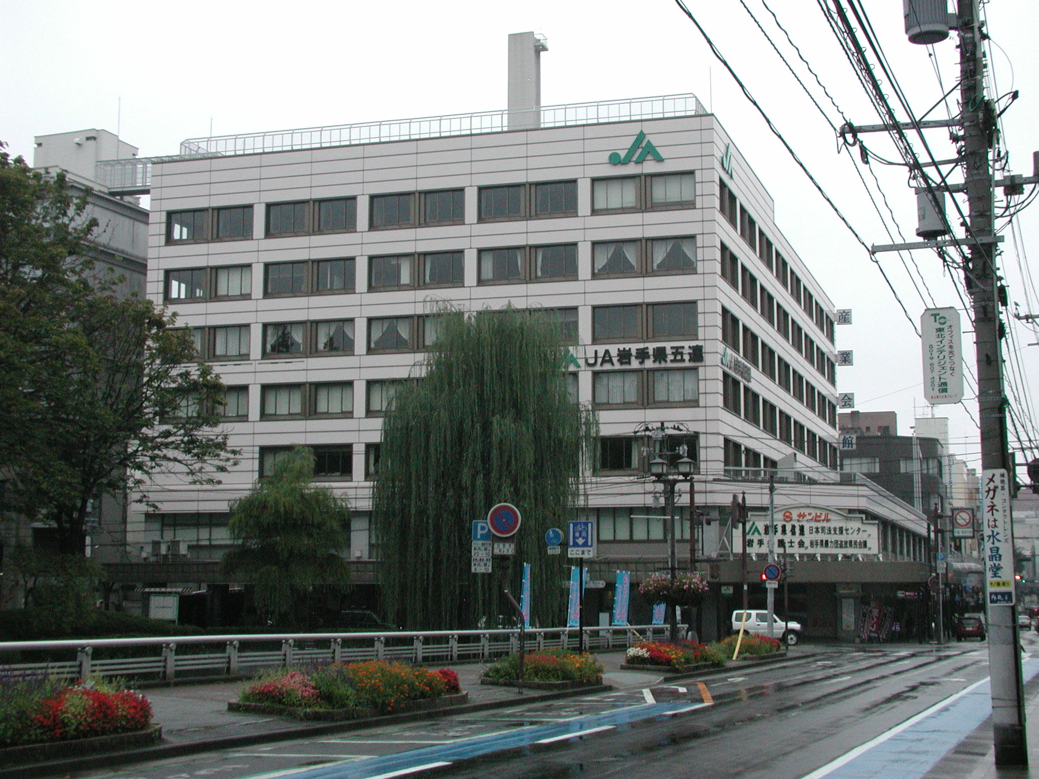 社団法人 岩手県産業会館